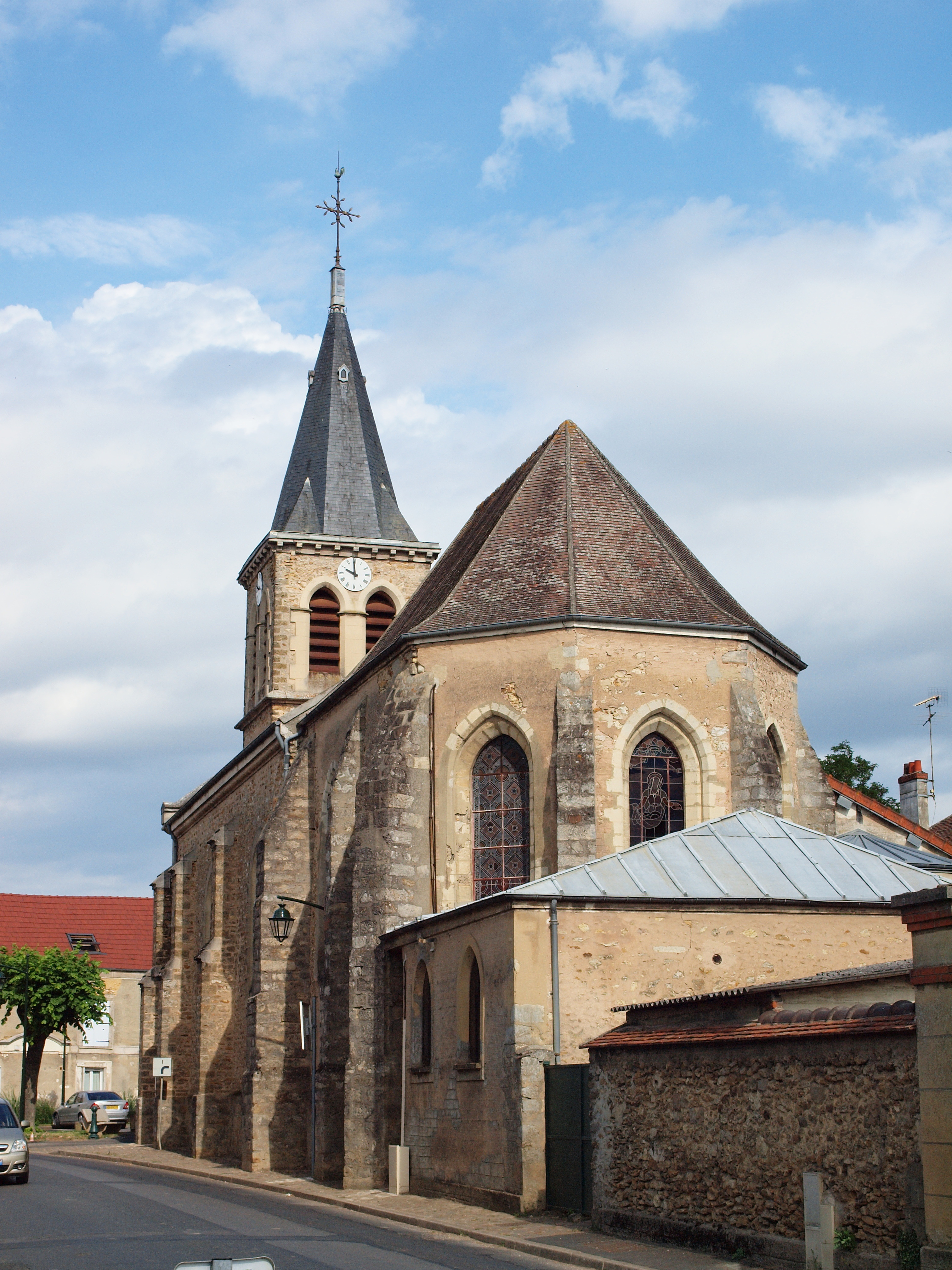 Église Sainte-Geneviève de Coubert (Seine-et-Marne, France)